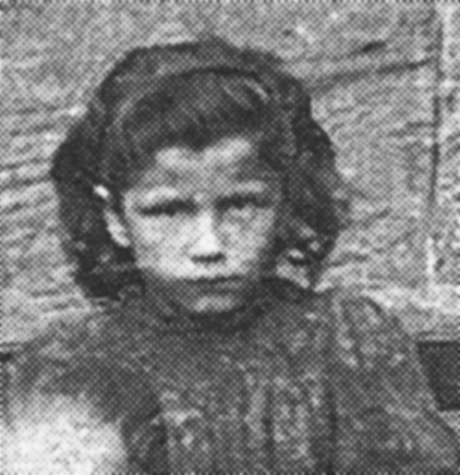 Name ist Programm ;)